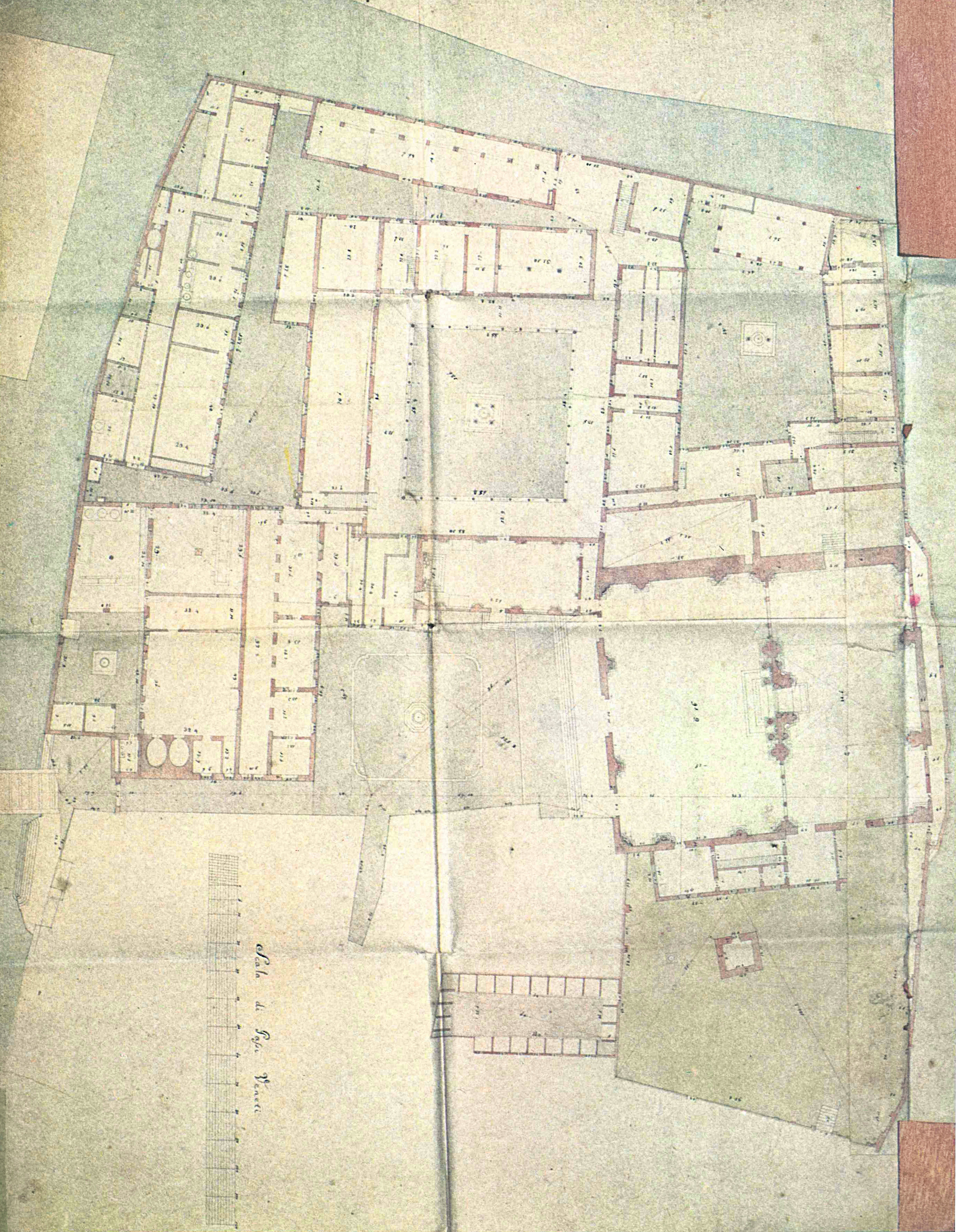 Mappa del convento nel 700